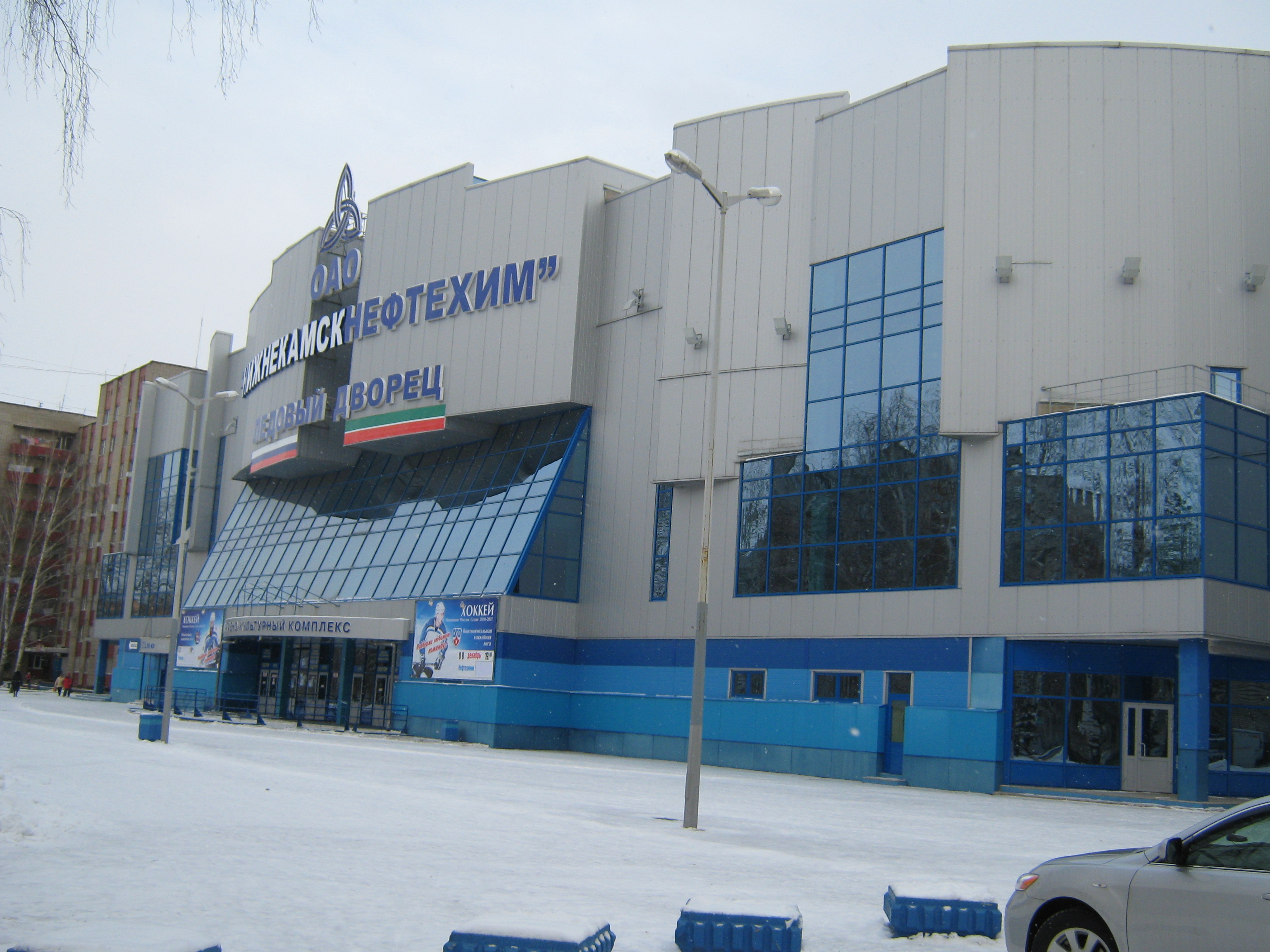 Ледовый дворец "Нижнекамскнефтехим"